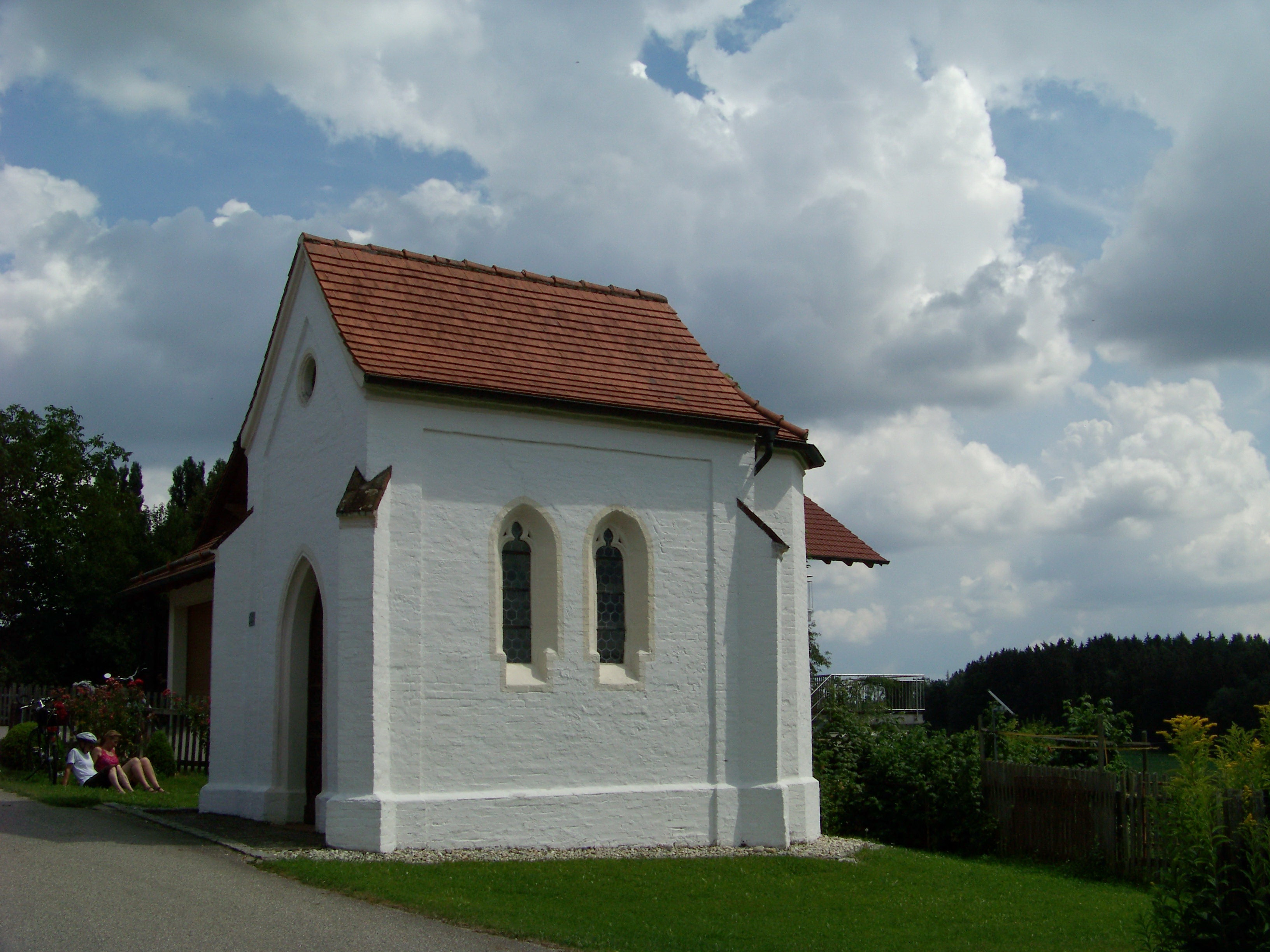 Großbettenrain neben Haus Nr. 3a. Kapelle. Neugotischer Backsteinbau mit Satteldach mit Putzgliederung, zweiten Hälfte des 19. Jahrhunderts; mit Ausstattung.